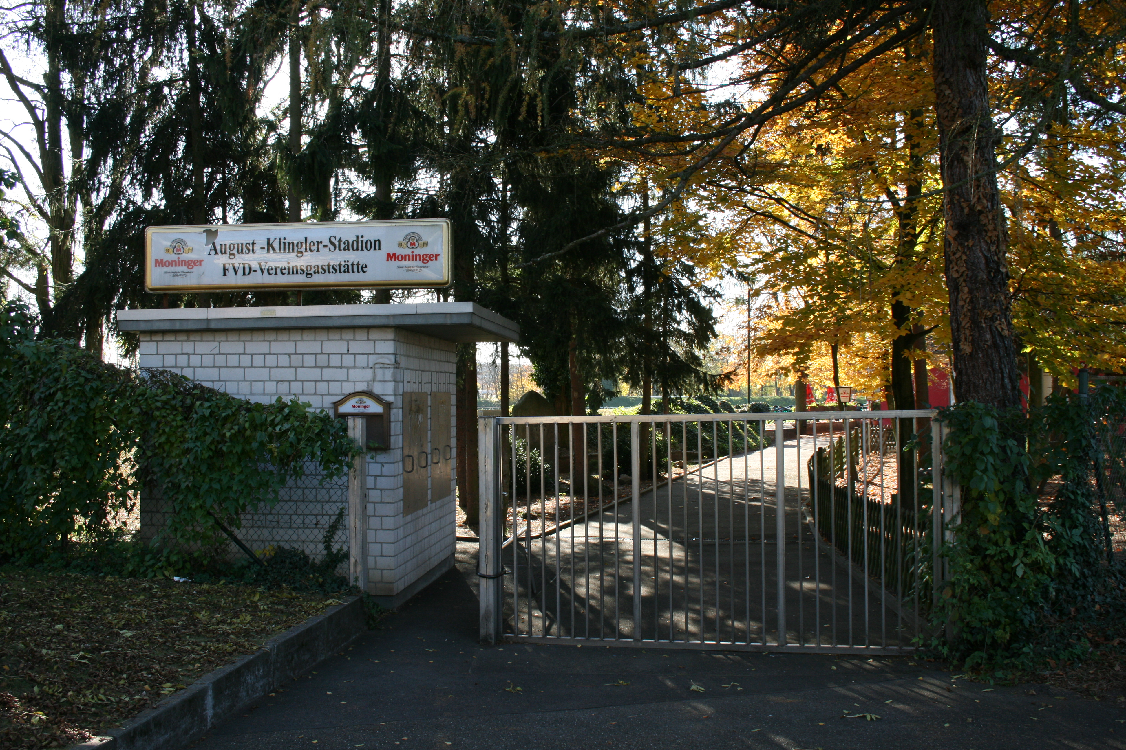 Eingang zum Stadion des FV Daxlanden